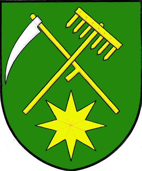 Česky: znak obce Komárov